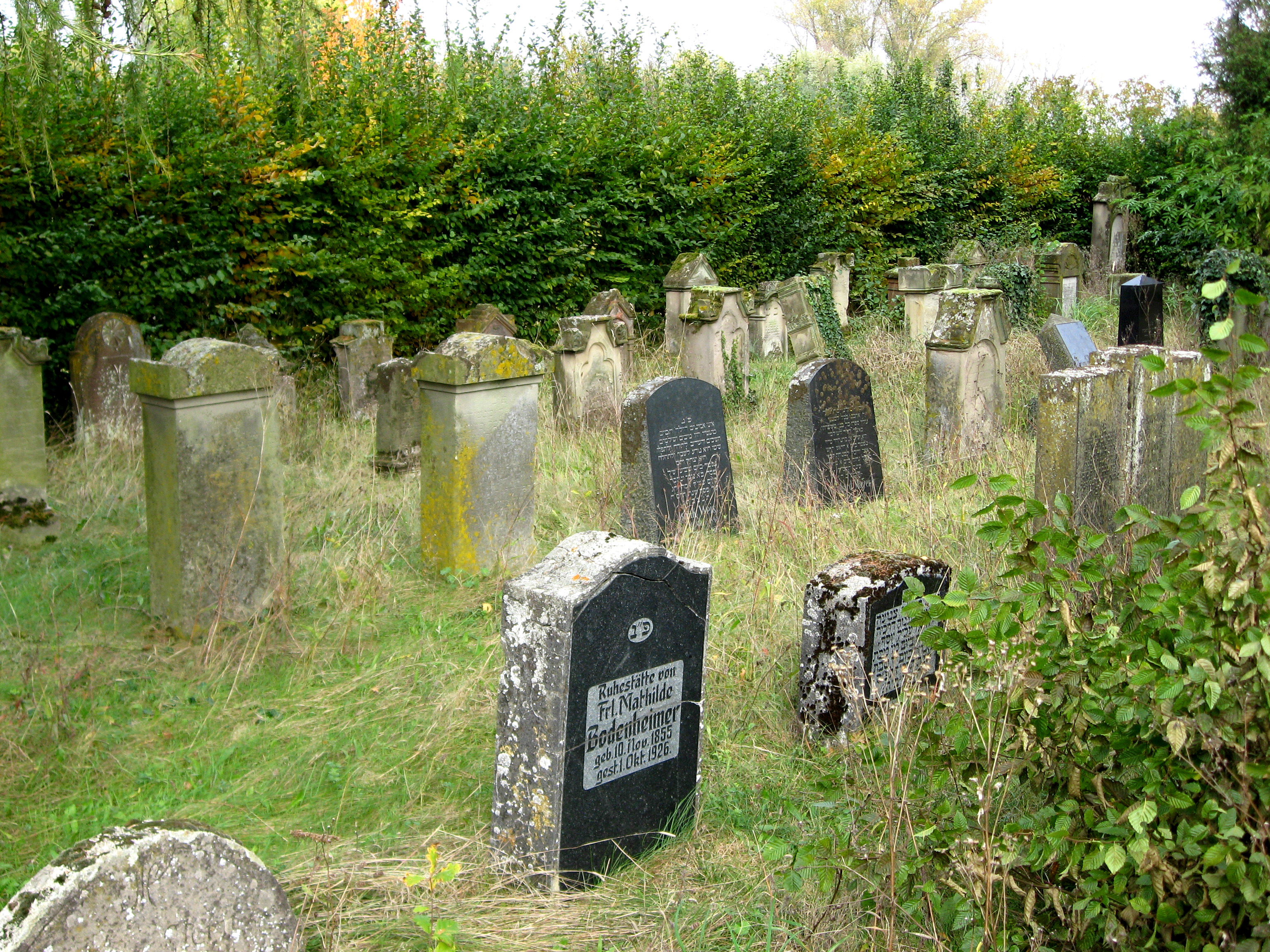 Jüdischer Friedhof bei Niederhochstadt, in vier Reihen aufgestellte Grabsteine